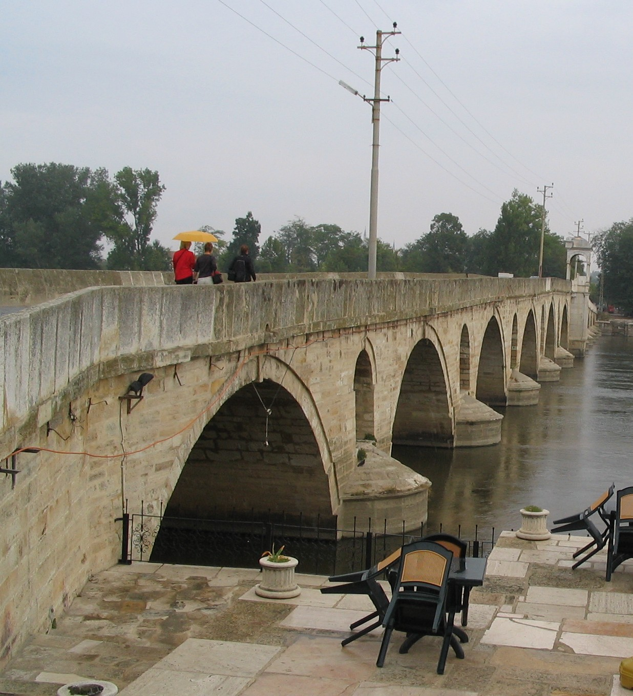 Stone bridge over Tundza River, Edirne